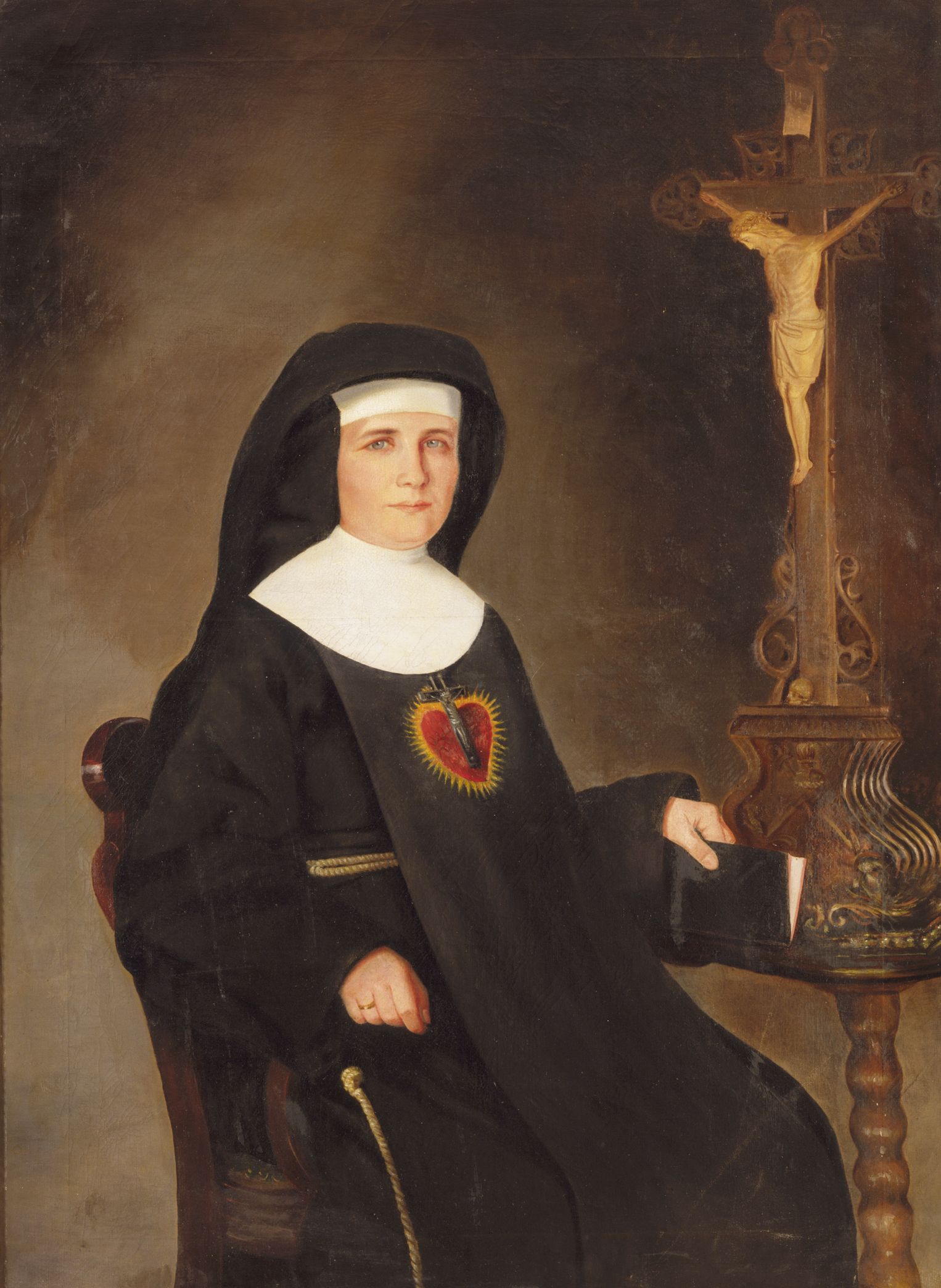 Obraz Klary Ludwiki Szczęsnej przechowywany w klasztorze Sercanek w Krakowie